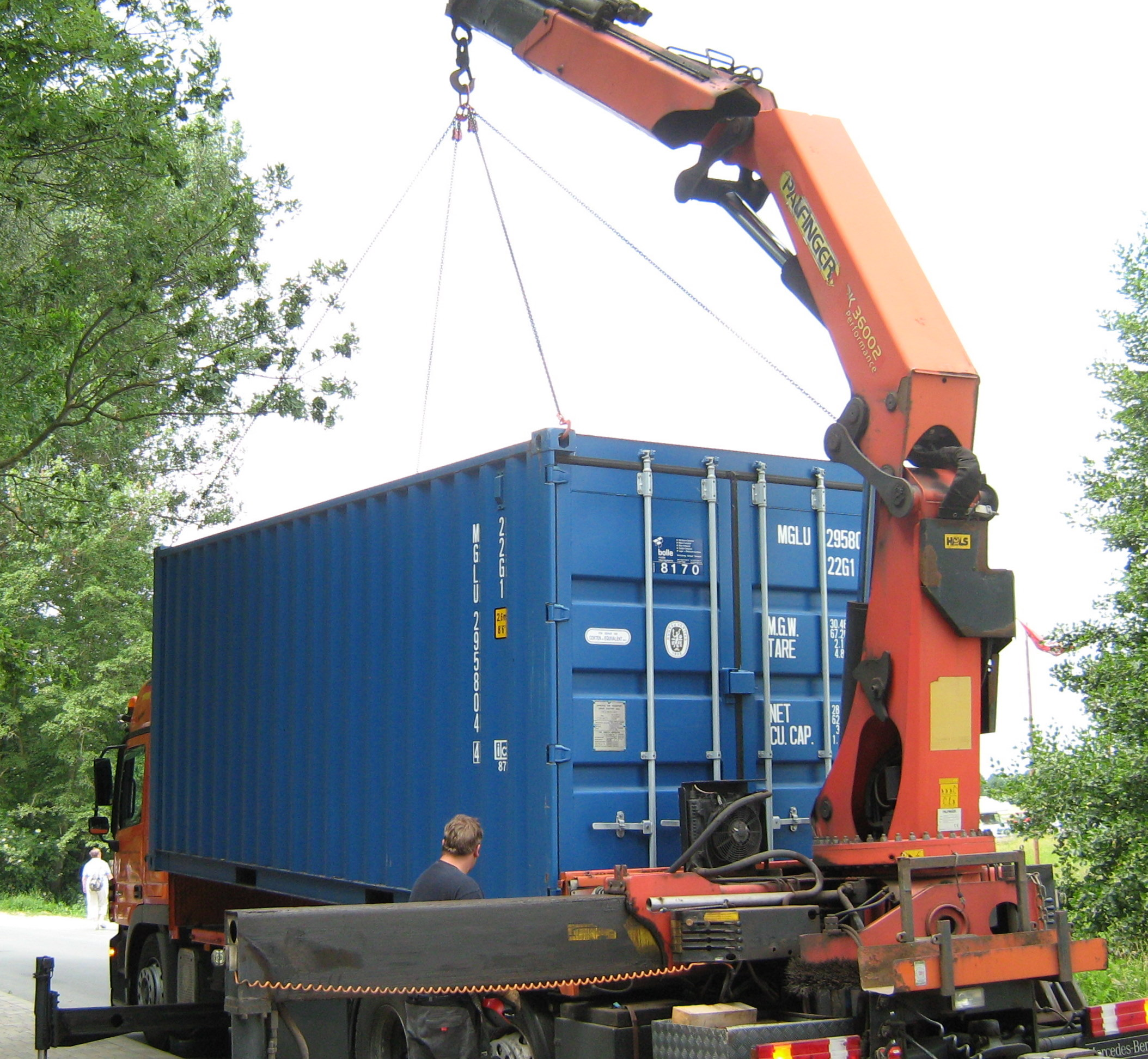 LKW-Ladekran Palfinger PK 36002